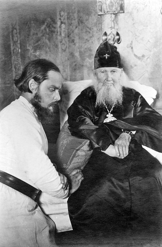 Священник Сергий Мечёв у митрополита Макария (Невского) в Николо-Угрешском монастыре. 1924